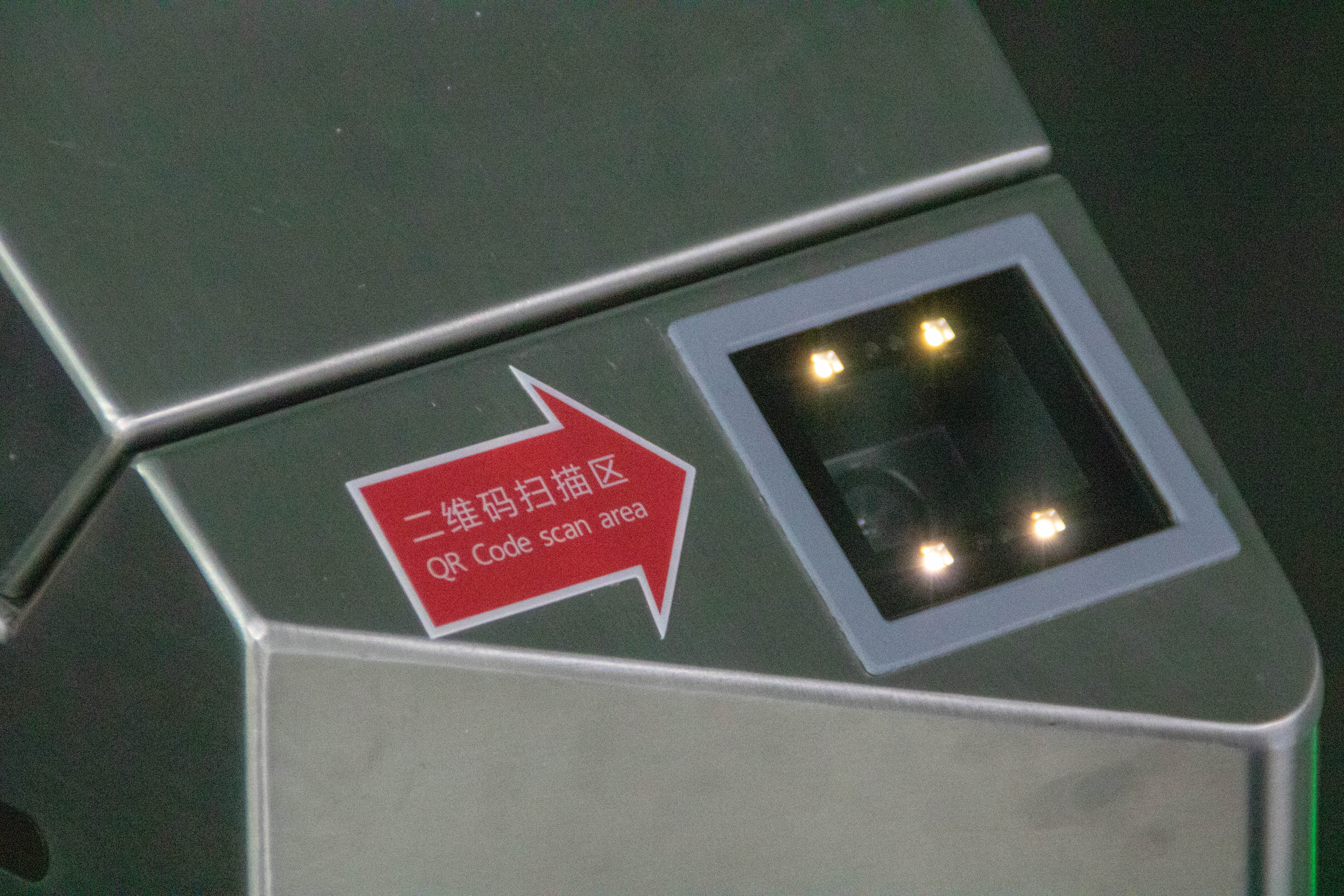 福州地铁1号线闸机二维码扫描口